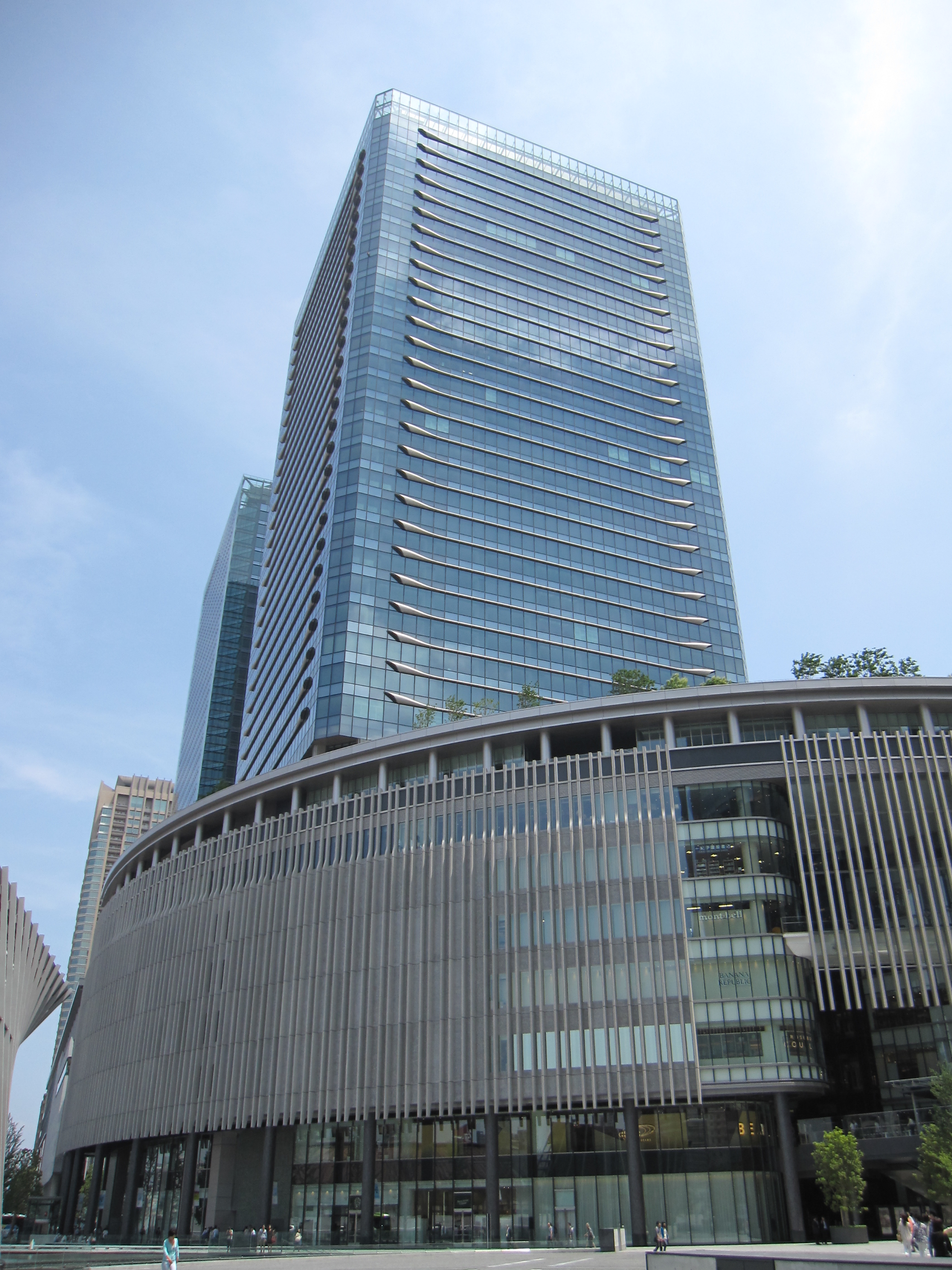 グランフロント大阪・南館